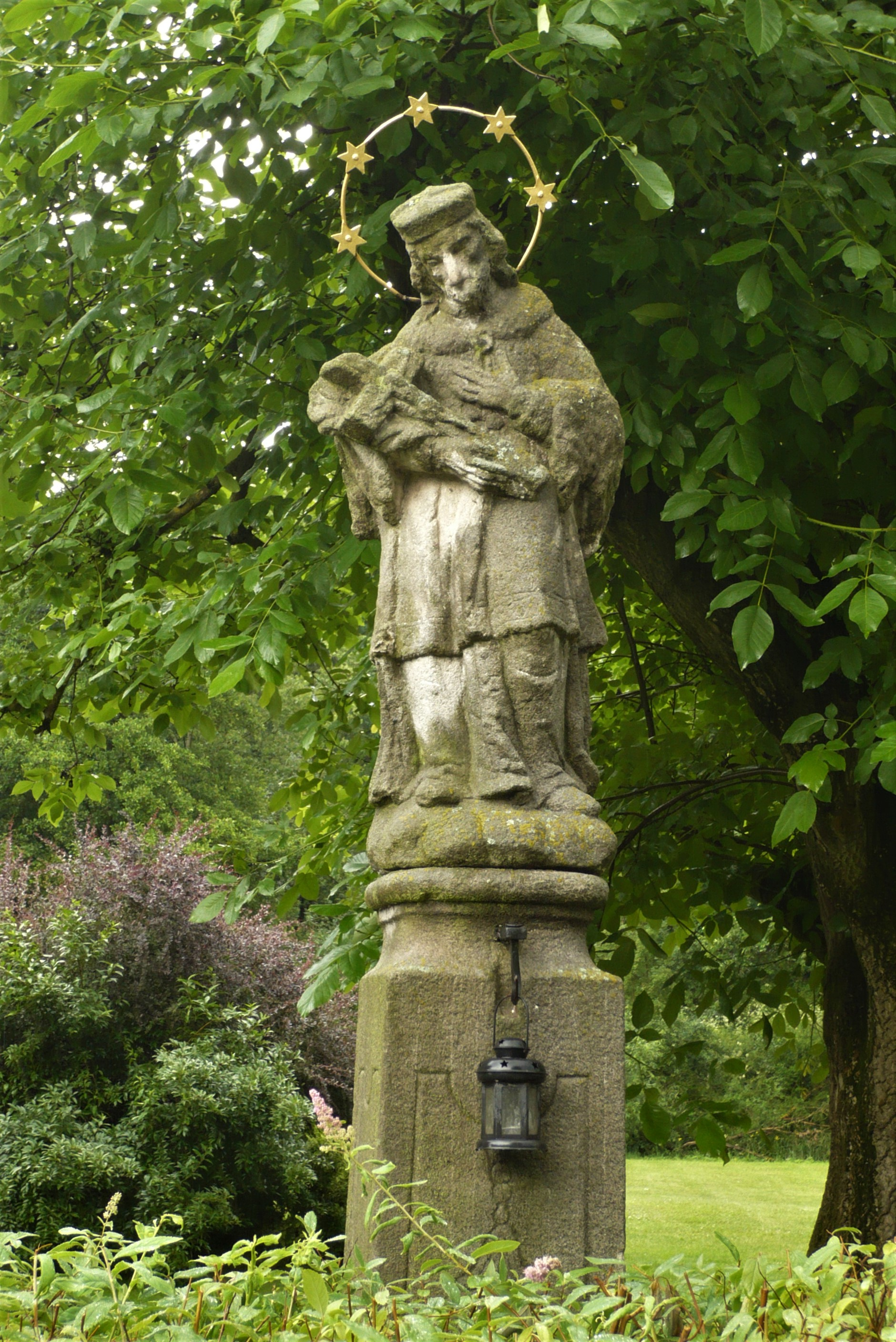 Nepomucen w Sonovie